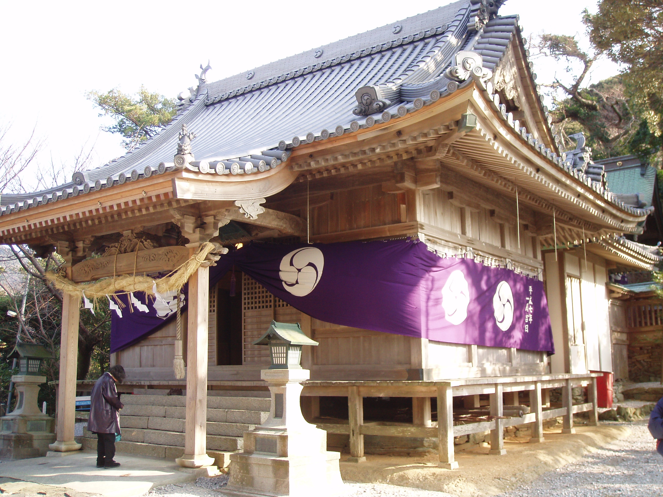 Misaki's Hachiman Shrine (八幡神社 Hachiman-jinja) in Ikata, Ehime Japan